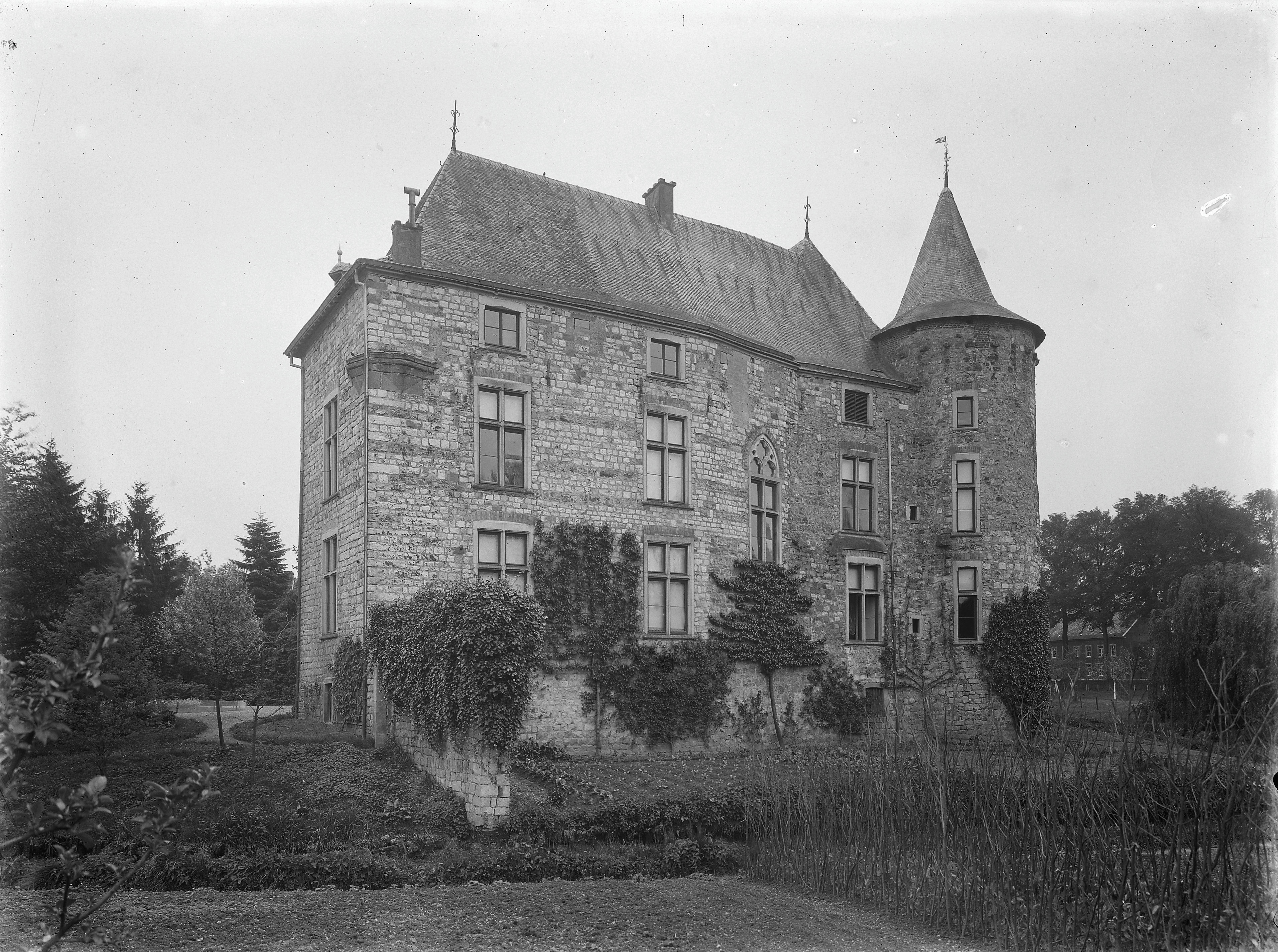 Kasteel Wittem: Overzicht achtergevel van een van de vleugels met hoektoren (opmerking: In: Buiten ; 11(1917), nr. 13, p. 155)